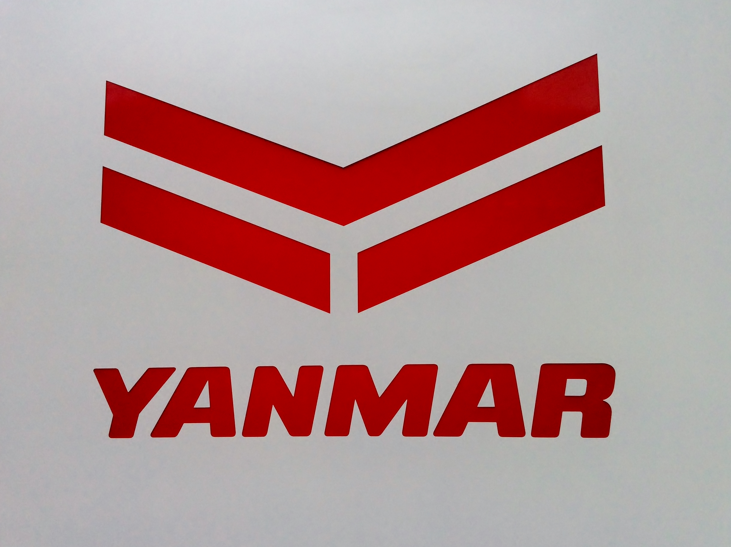 ヤンマーのロゴを撮影。